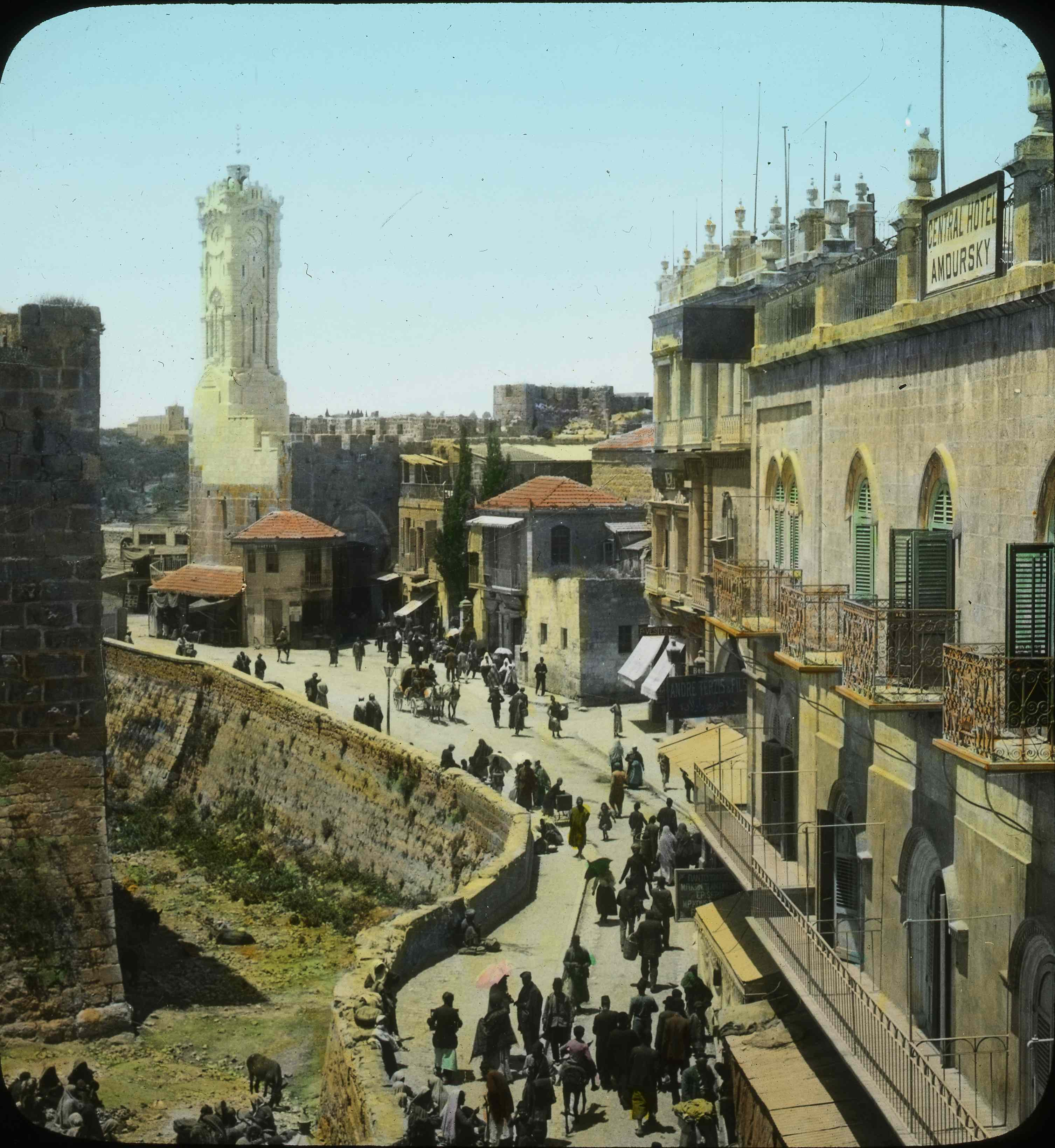 הרחבה הפנימית של שער יפו עם מלון אמדורסקי